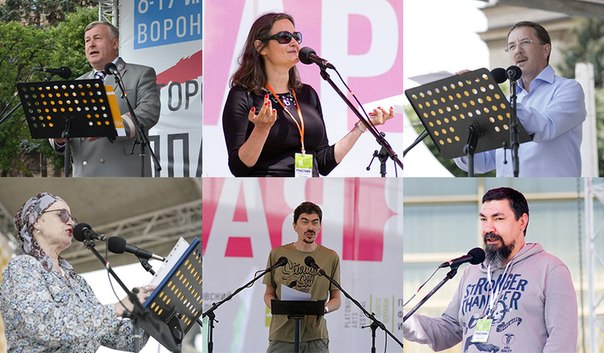 Платоновские фестивальные чтения